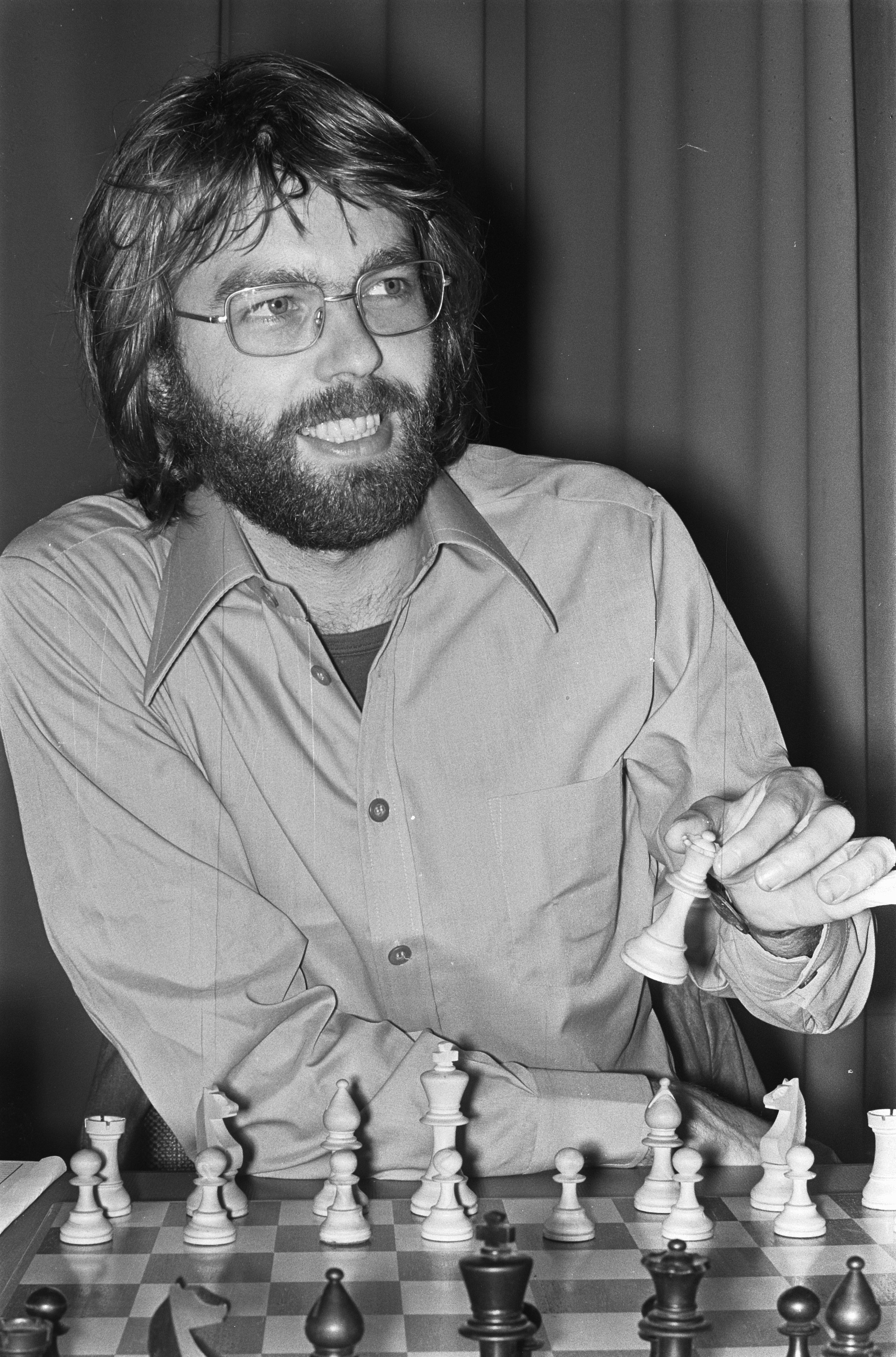 Collectie / Archief : Fotocollectie Anefo Reportage / Serie : IBM schaaktoernooi 1975 te Amsterdam Beschrijving : Schaker Hans Böhm Annotatie : Randnummer negatiefstrook: nr 6 Szabo (Hong) Datum : 8 juli 1975 Locatie : Amsterdam, Noord-Holland Trefwoorden : portretten, schaken, toernooien Persoonsnaam : Böhm, Hans Instellingsnaam : IBM-Schaaktoernooi Fotograaf : Fotograaf Onbekend / Anefo Auteursrechthebbende : Nationaal Archief Materiaalsoort : Negatief (zwart/wit) Nummer archiefinventaris : bekijk toegang 2.24.01.05 Bestanddeelnummer : 928-0390